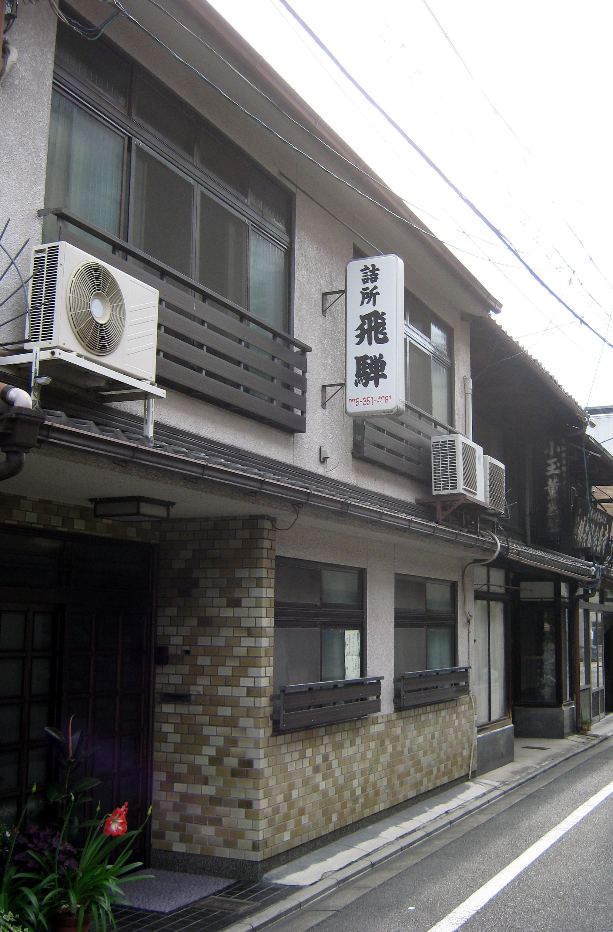 詰所